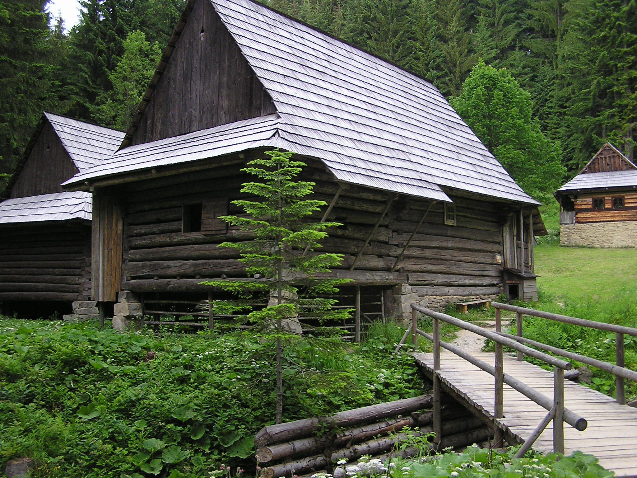 Museum Vychylovka, Slovakia